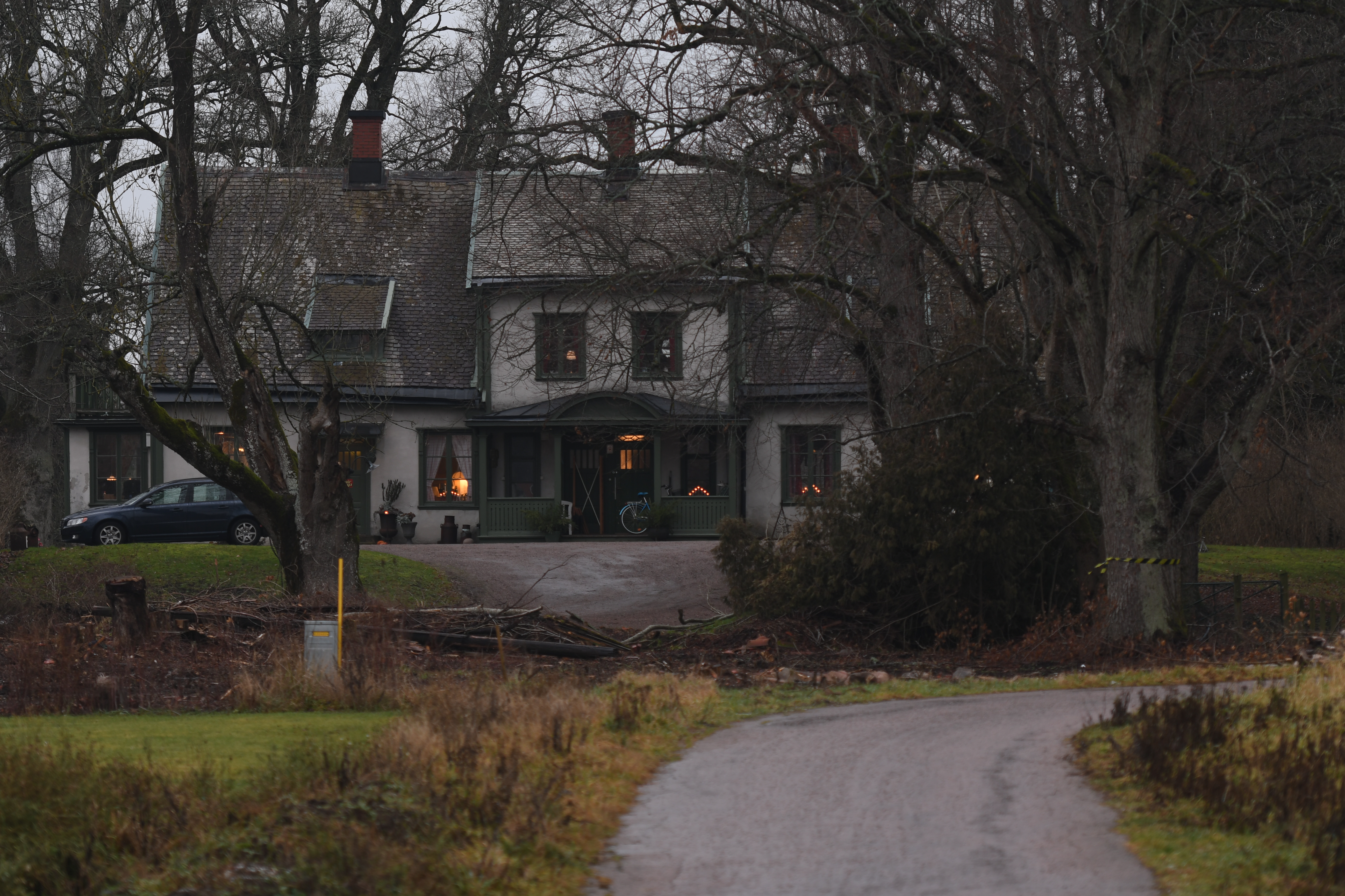 Nabbensbergs herrgård, Onsjö, Vänersborg.